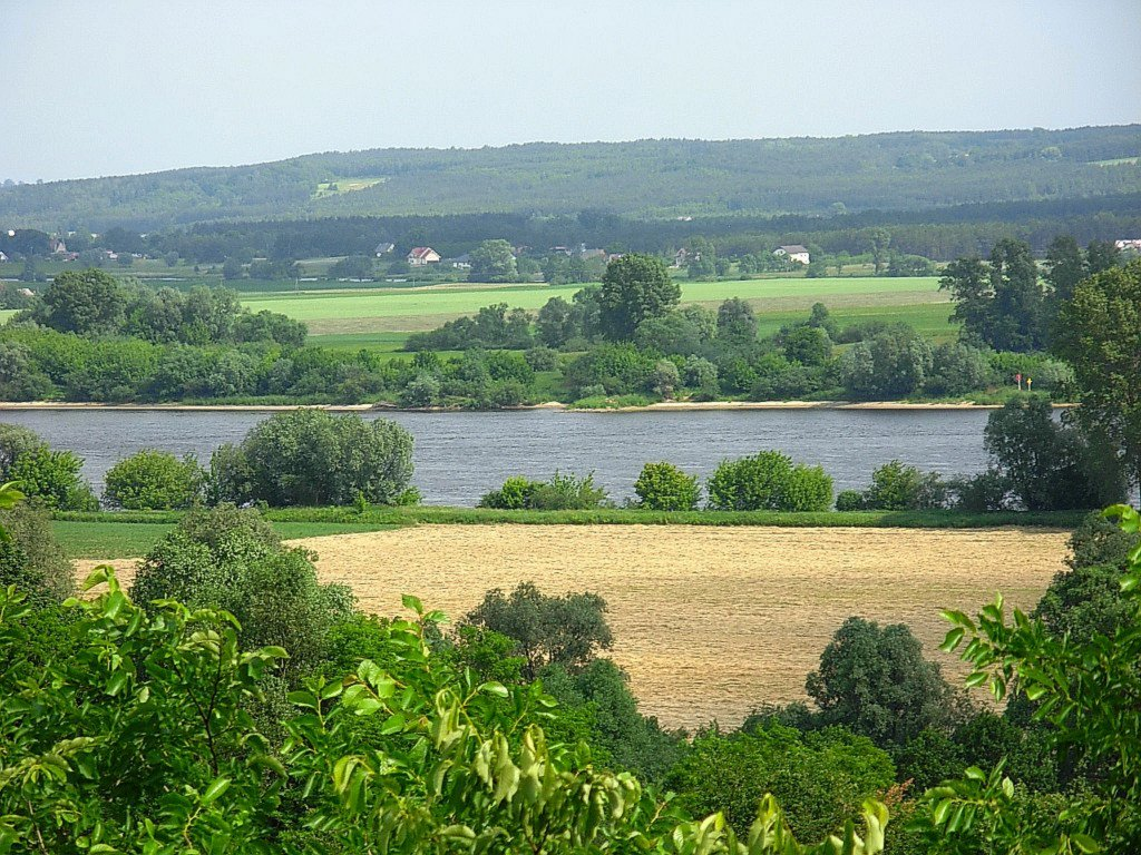 Wisła w Trzęsaczu